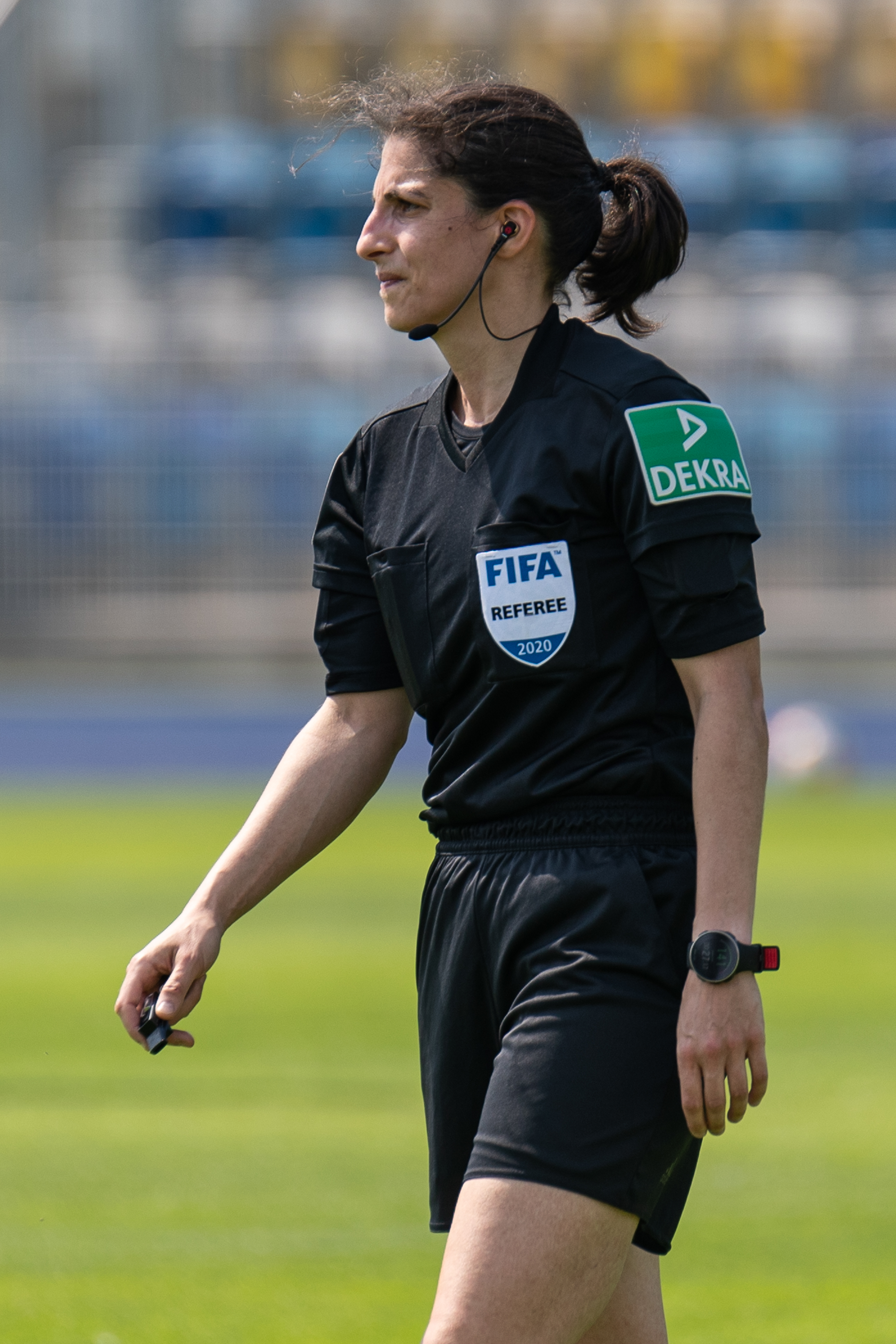 Fußball, Flyeralarm Frauen-Bundesliga, FF USV Jena - Bayer 04 Leverkusen; Schiedsrichterin, referee Dr. Riem Hussein; Freisteller, Einzelbild; Porträt